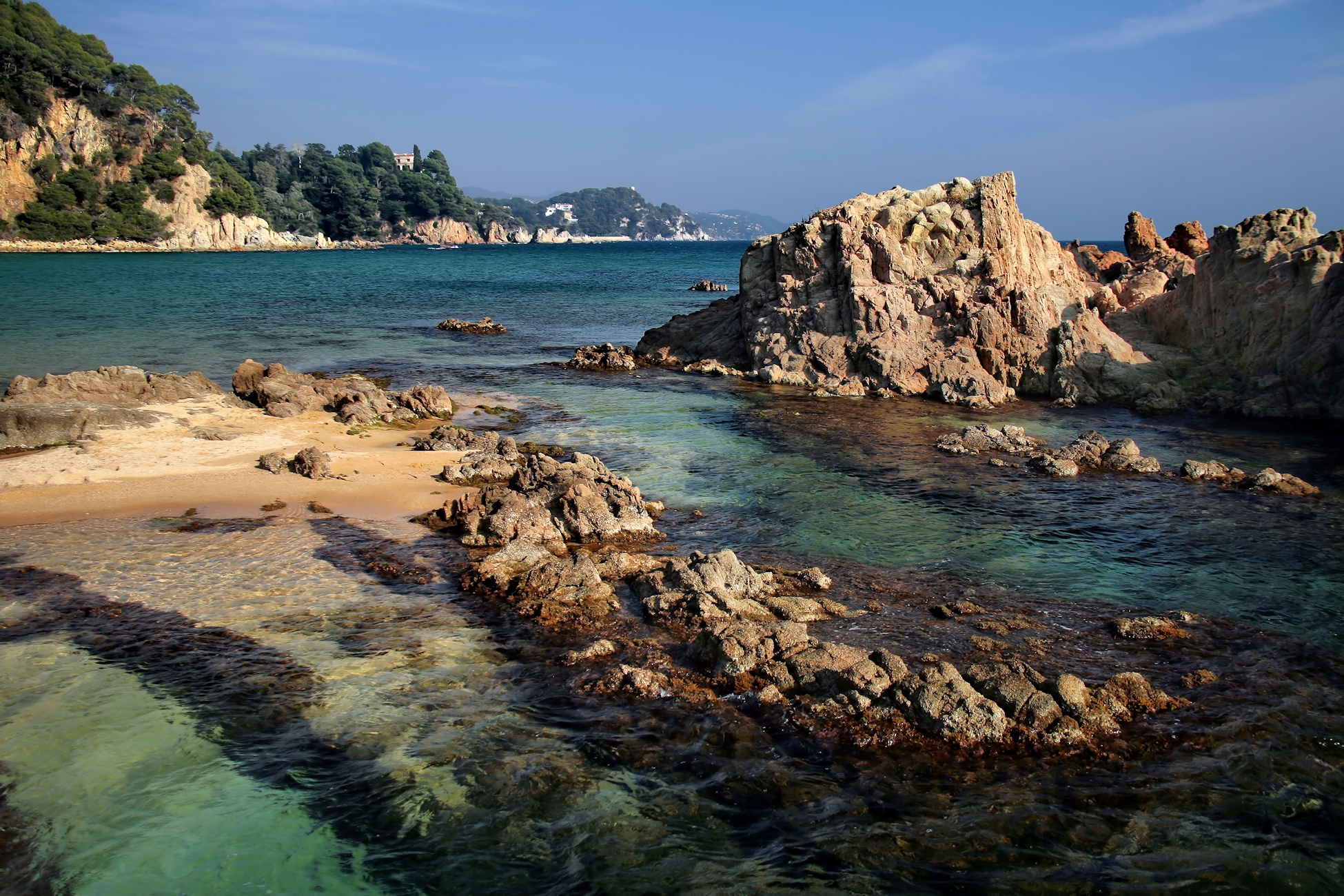 Platja de Santa Cristina